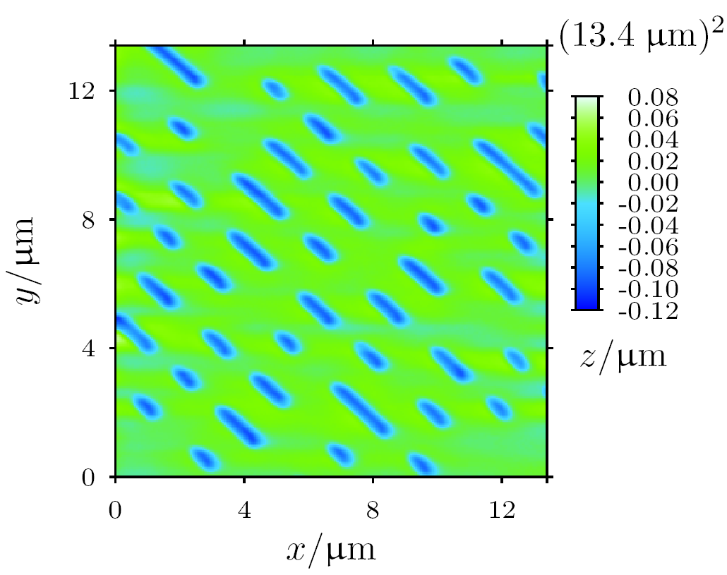 Rasterkraftmikroskopische Abbildung der Datenschicht einer Compact Disc. Constant force mode (30 Nanonewton).